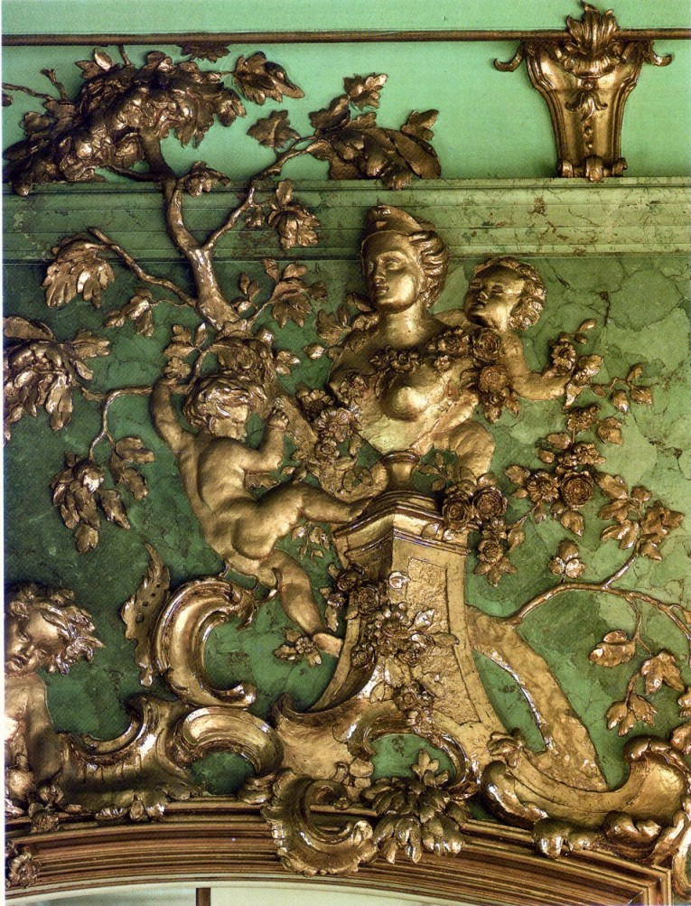 Berlin, Schloss (i.e. palace) Charlottenburg, Goldene Galerie (Golden Gallery). Detail